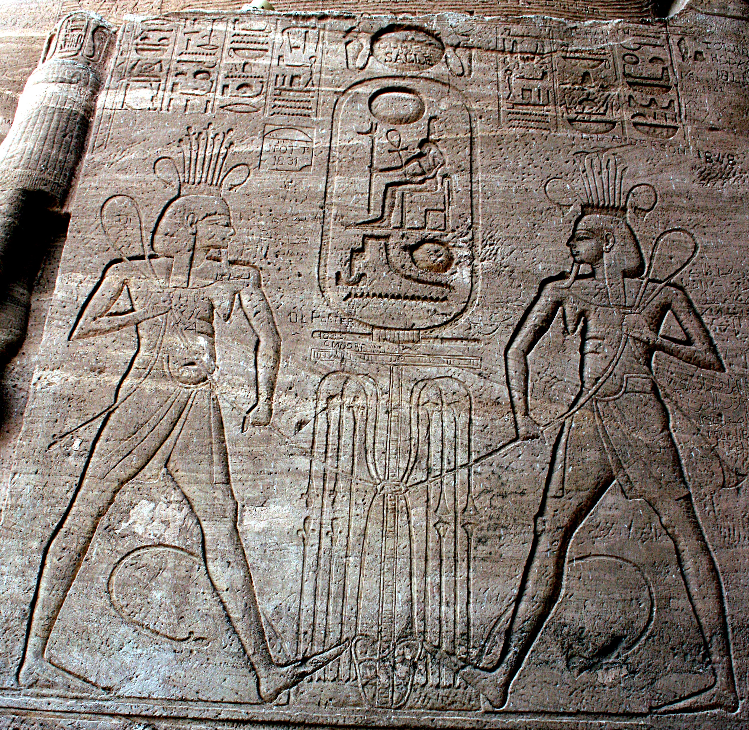 Abu_Simbel,_Großer_Tempel